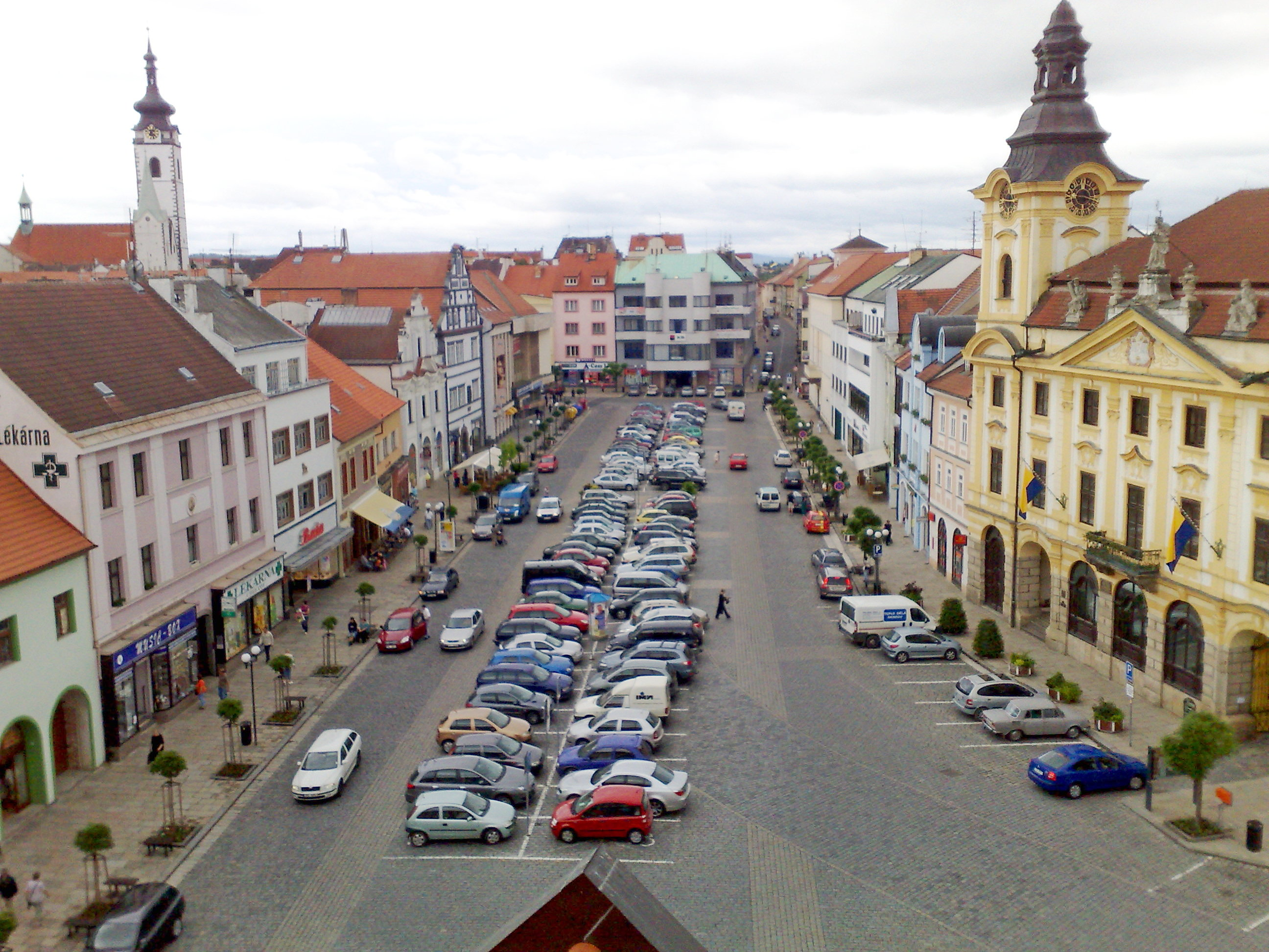 Písek, Velké naměstí.